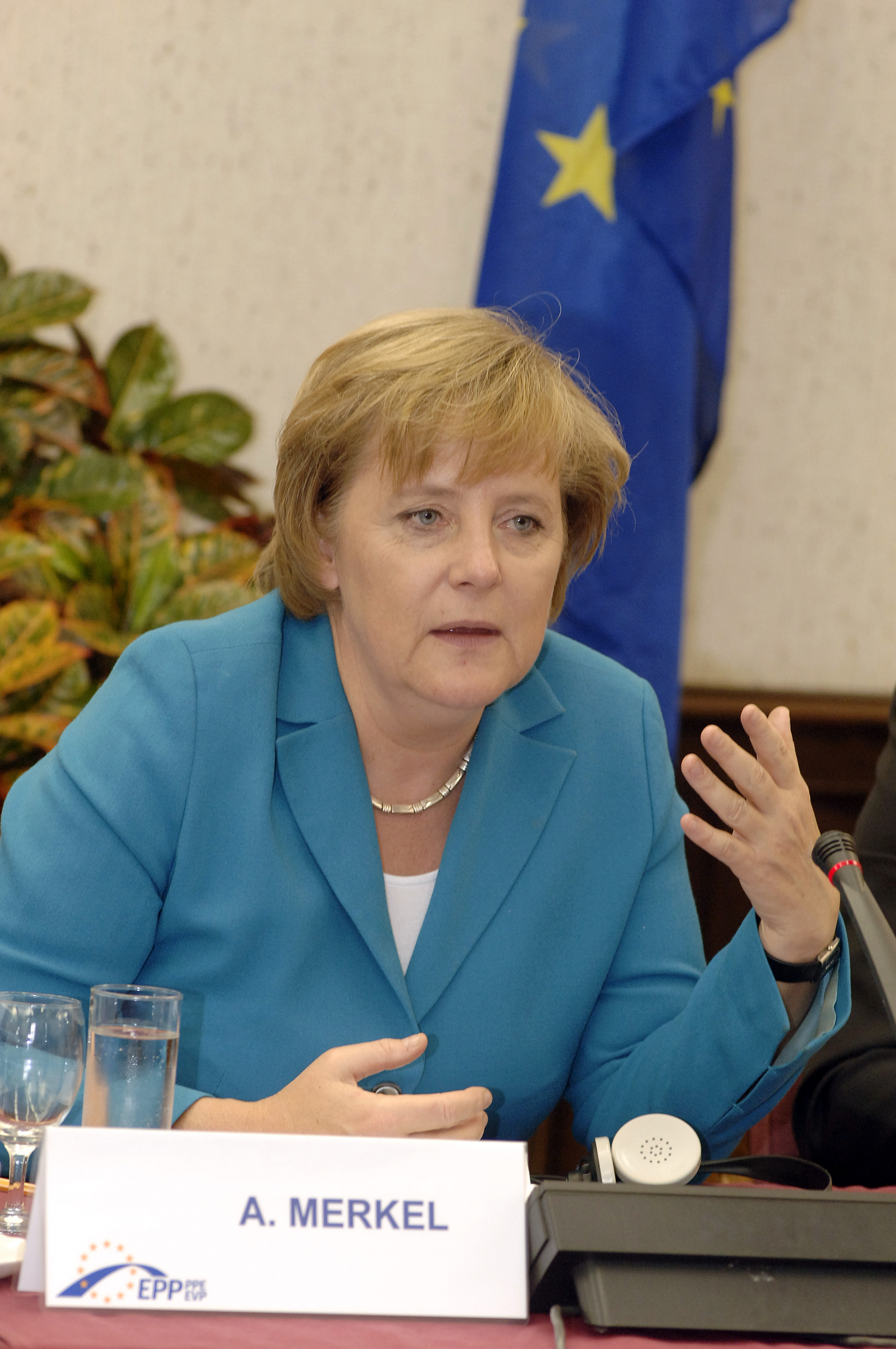 EPP Sumiit 15 May 2006